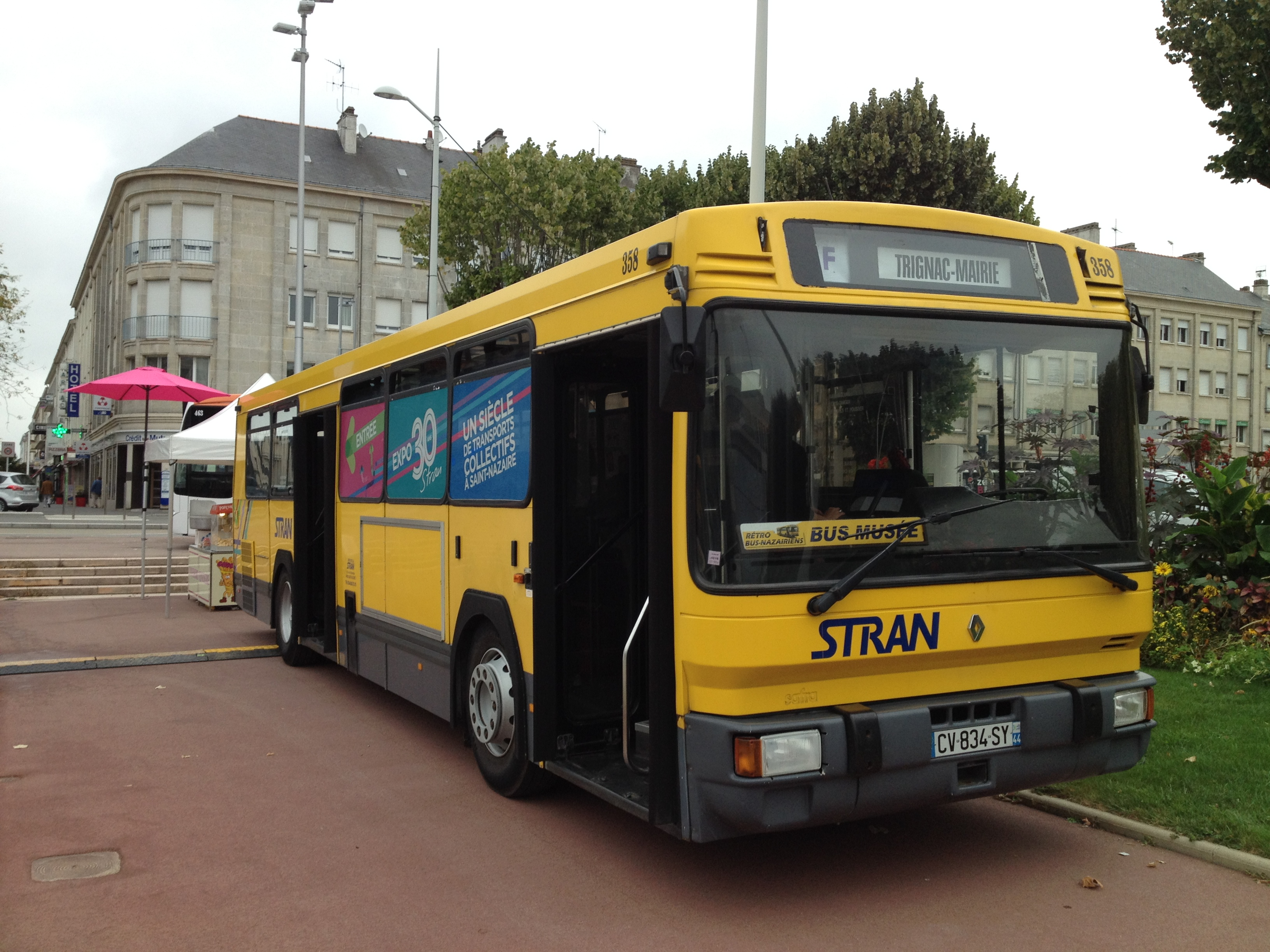 Exposition du PR 112 numéro 358 lors des 30 ans de la Stran